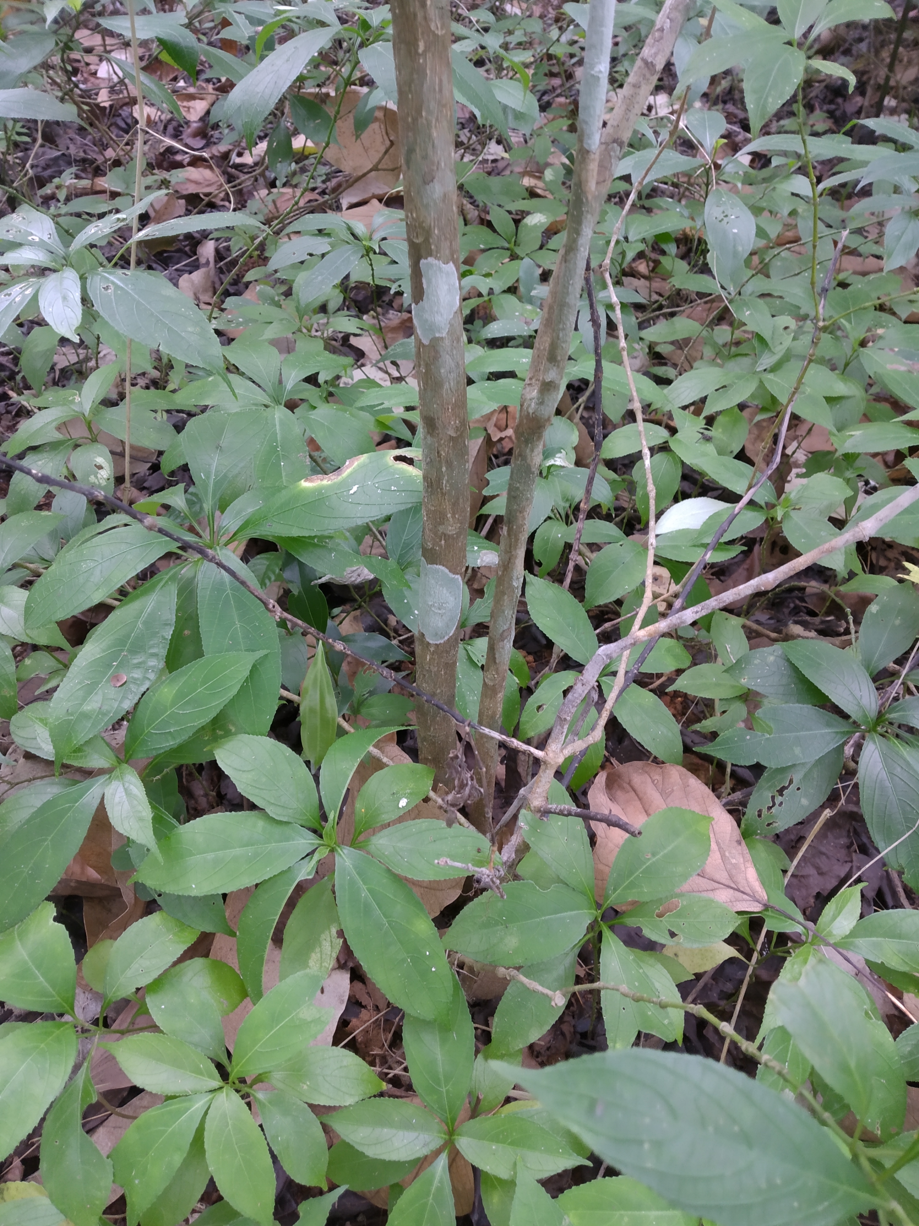 ಕನ್ನಡ: ದುರ್ವಾಸನೆ ಮರ